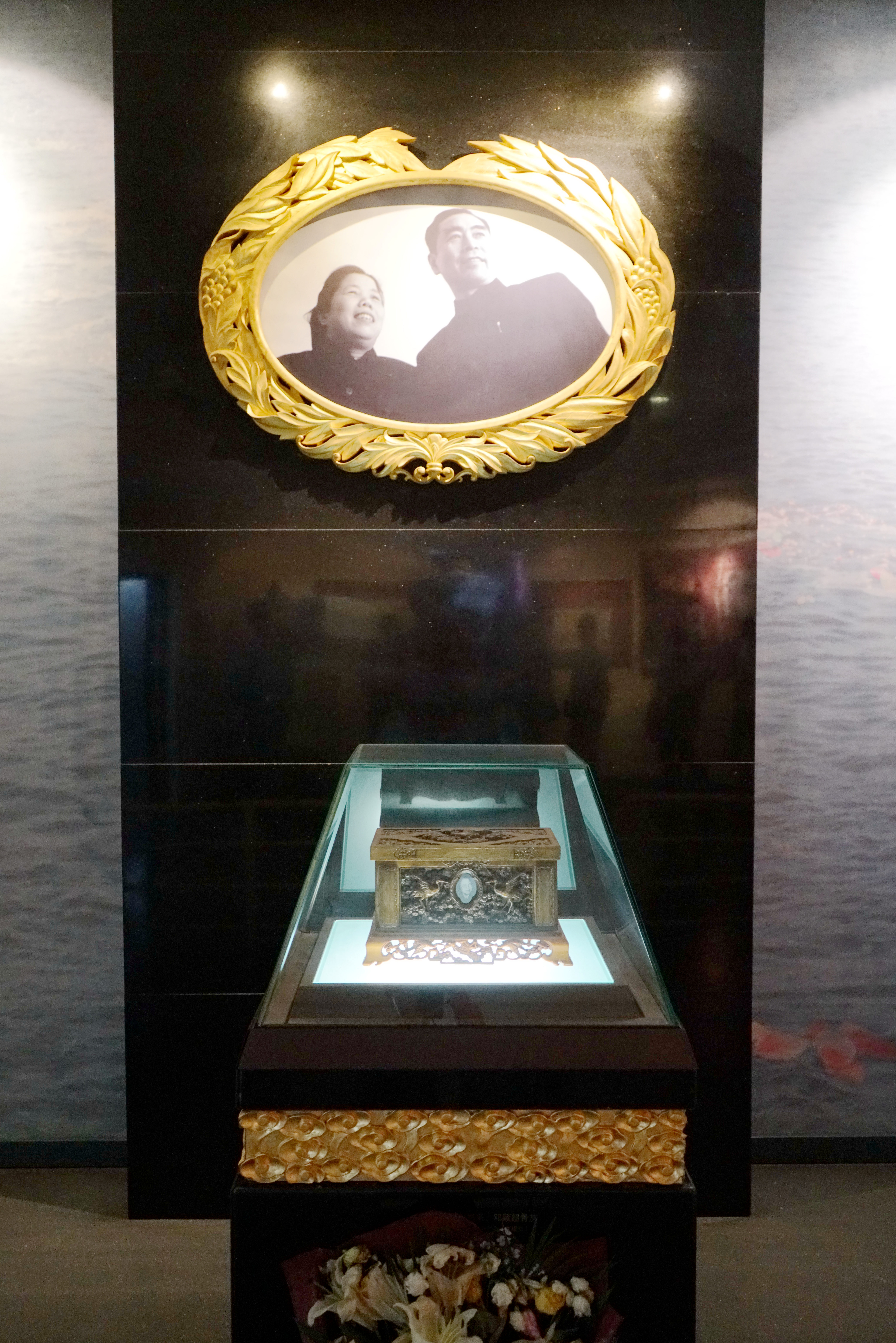 中文（中国大陆）: 周邓纪念馆 瞻仰厅